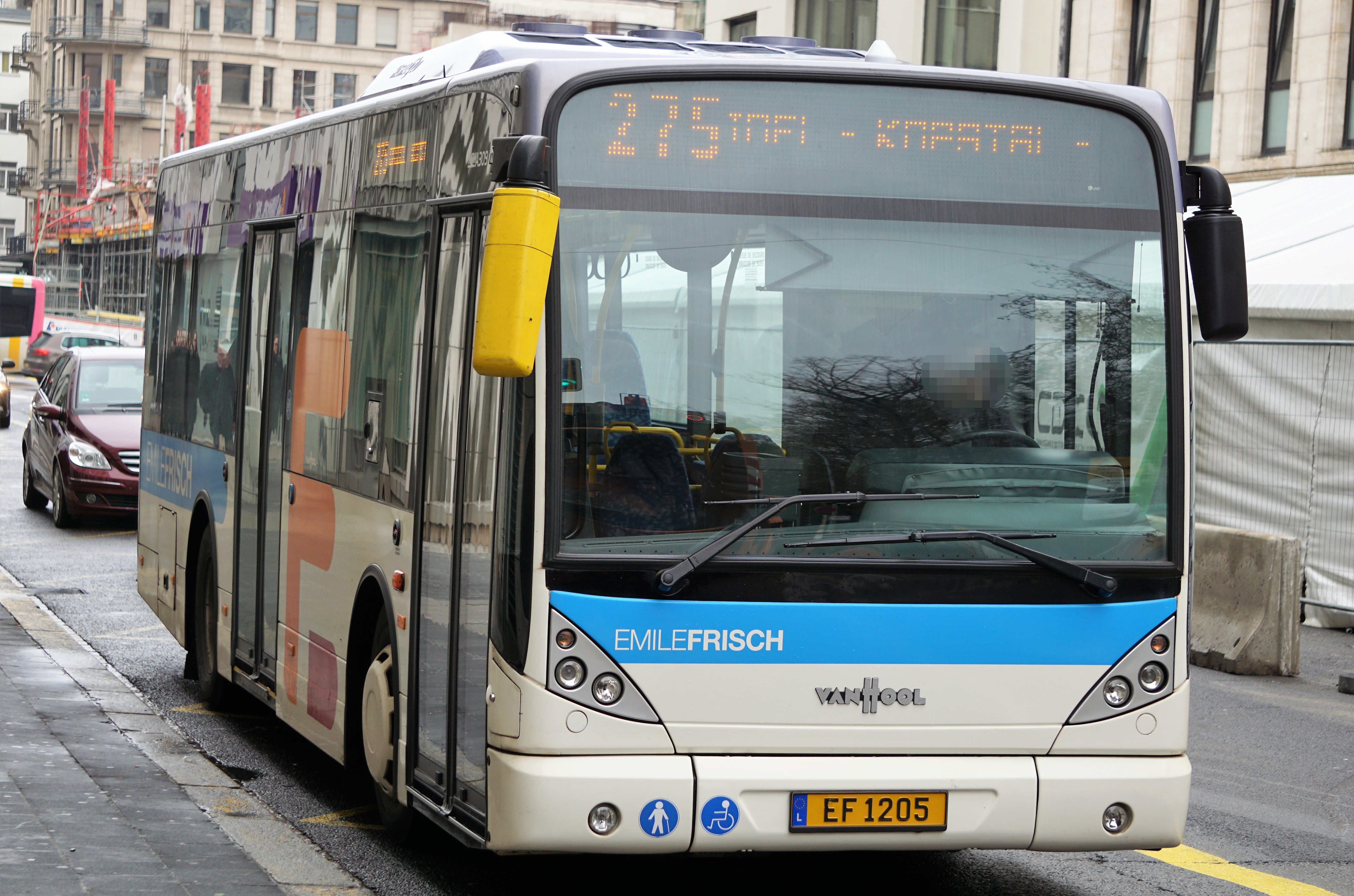 Luxembourg, avenue Emile-Reuter, EF1205, Emile Frisch, ligne 275 direction Kopstal-Schoenfels.